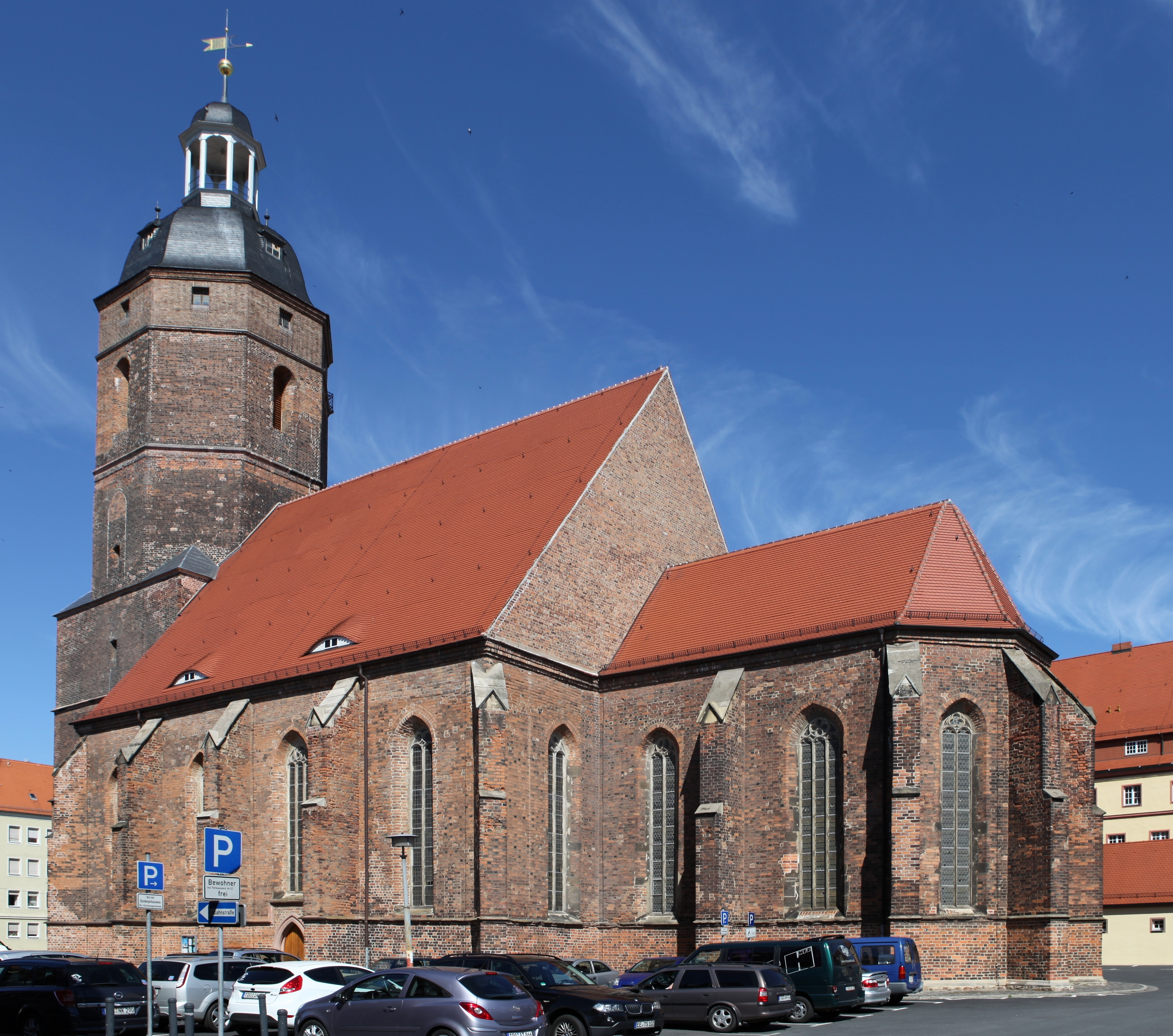 Kulturdenkmal Stadtkirche St. Andreas und St. Nikolai in Eilenburg; Objektnummer: 08973340